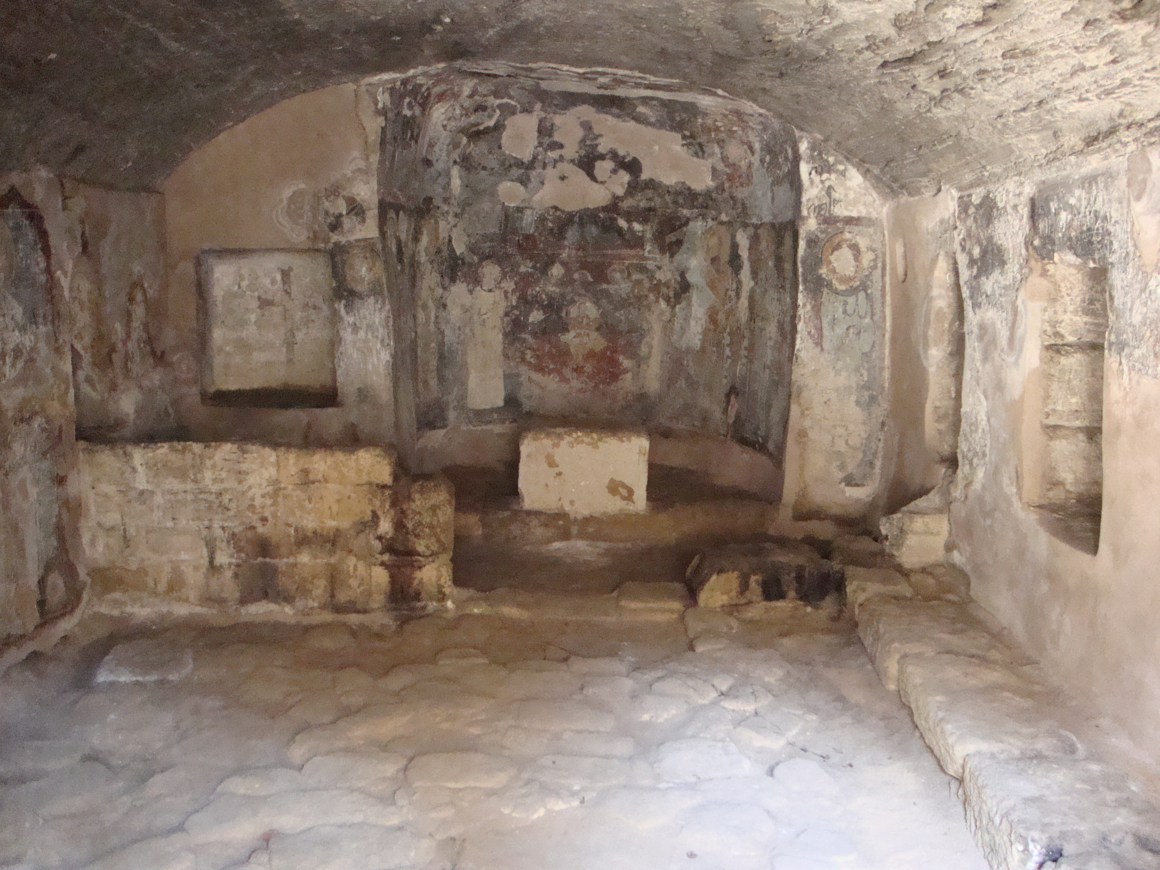 Катакомбы Святой Соломонии. Пафос (Кипр). 09.2013